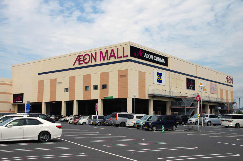 イオンシネマ石巻（イオンモール石巻シネマ側）